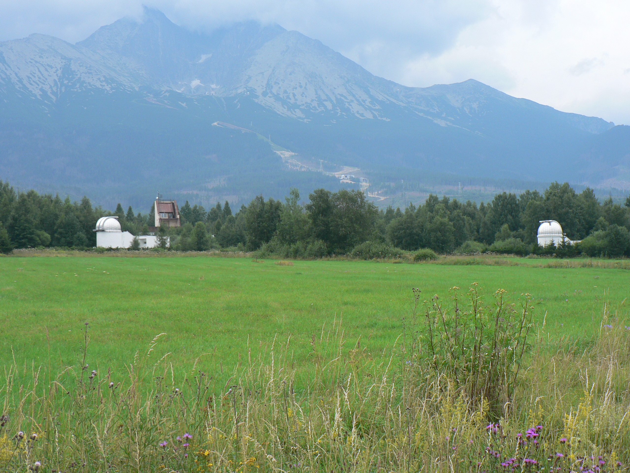 Obserwatorium astronomiczne w Starej Leśnej, w tle Rakuska Przełęcz i Rakuska Czuba